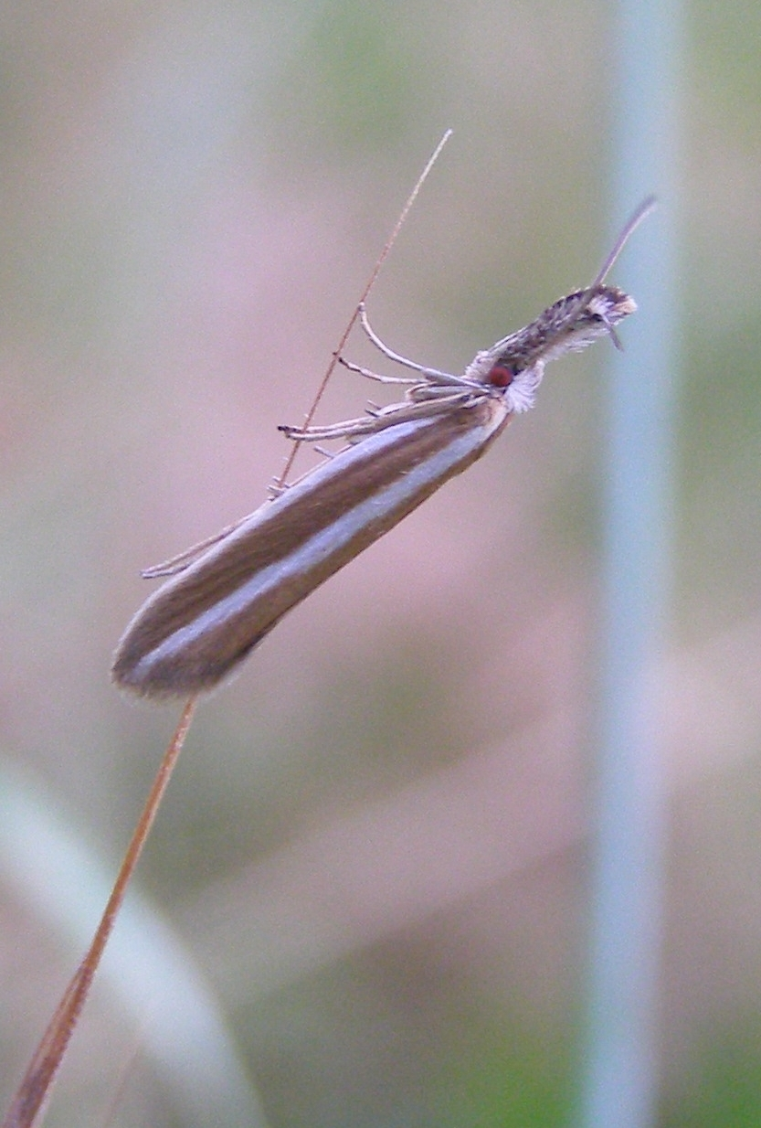 Pleurota aristella, Oecophoridae